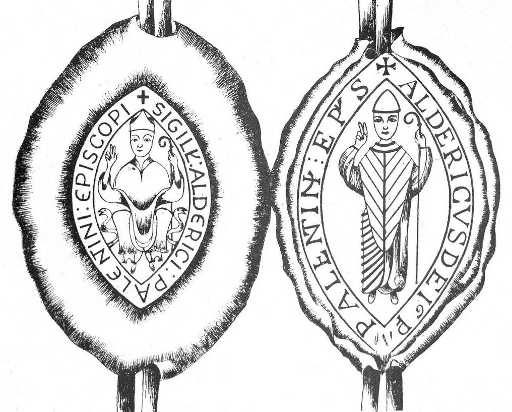 Sello y contrasello del obispo de Palencia Arderico (m. 1208)